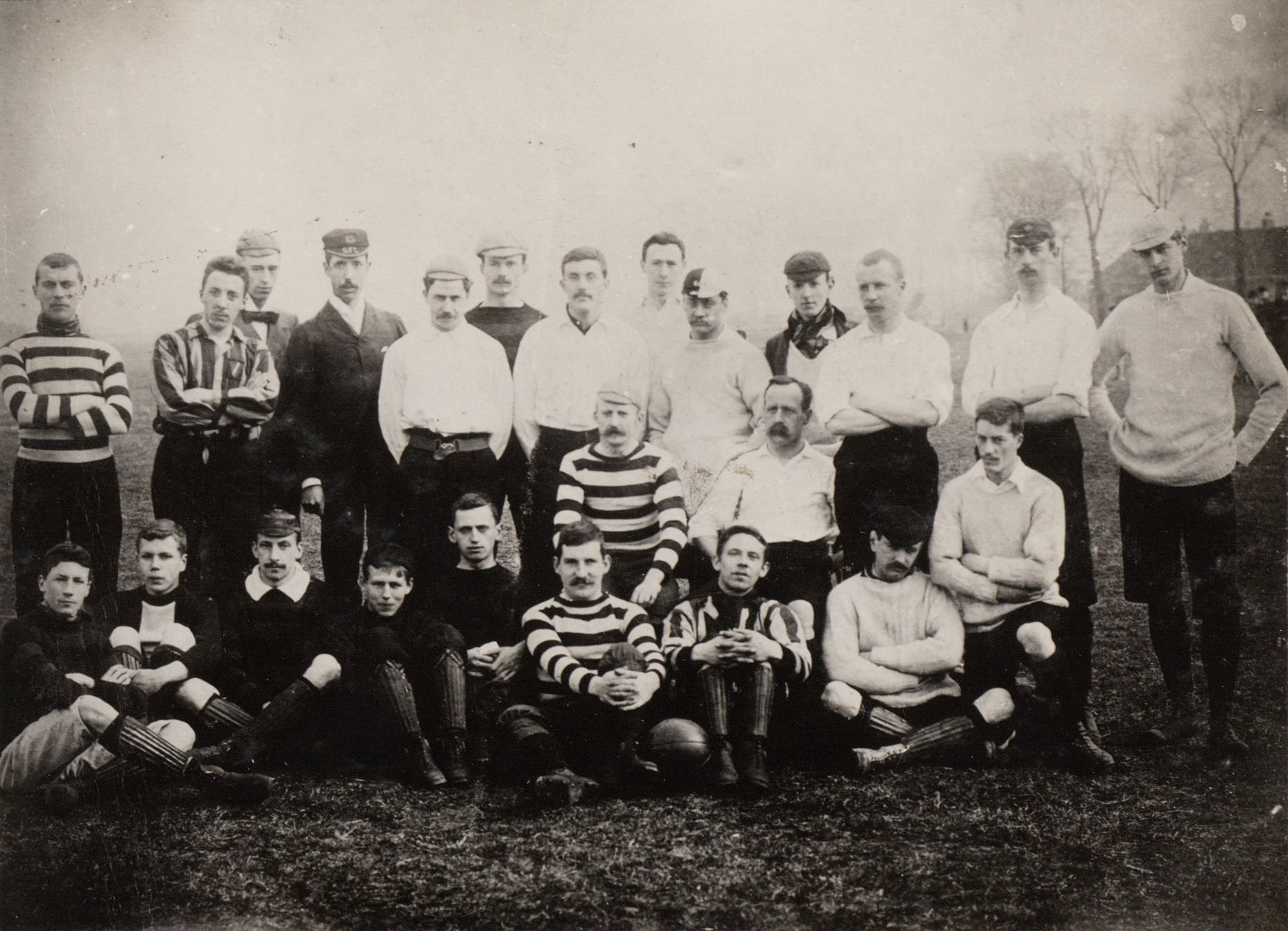 Nederlands elftal voor de wedstrijd tegen Maidstone. Nederlands elftal - Maidstone (1-2), gespeeld op 31 maart 1895 op het HFC-terrein te Heemstede. Opstelling: Coops (HVV), Kees van Hasselt (Sparta), Schorer (HFC), Dolleman (HFC), Stok G.Jzn. (Sparta), Jhr. van den Bosch (HVV), Putman Cramer (HFC), Menten (HFC), Monod de Froideville (HVV), Eijken (HVV) en Pim Mulier (HFC, aanvoerder) (Mitte, mit heller Kappe).